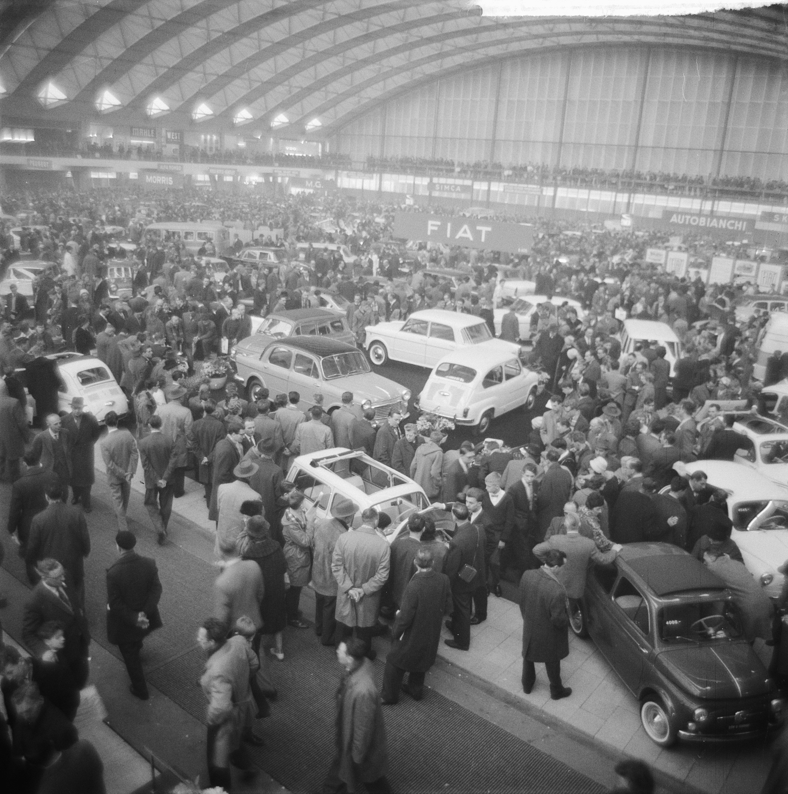 Collectie / Archief : Fotocollectie Anefo Reportage / Serie : [ onbekend ] Beschrijving : Drukte in RAI Datum : 5 februari 1961 Trefwoorden : druktes Instellingsnaam : RAI Fotograaf : Nijs, Jac. de / Anefo Auteursrechthebbende : Nationaal Archief Materiaalsoort : Negatief (zwart/wit) Nummer archiefinventaris : bekijk toegang 2.24.01.03 Bestanddeelnummer : 912-0625